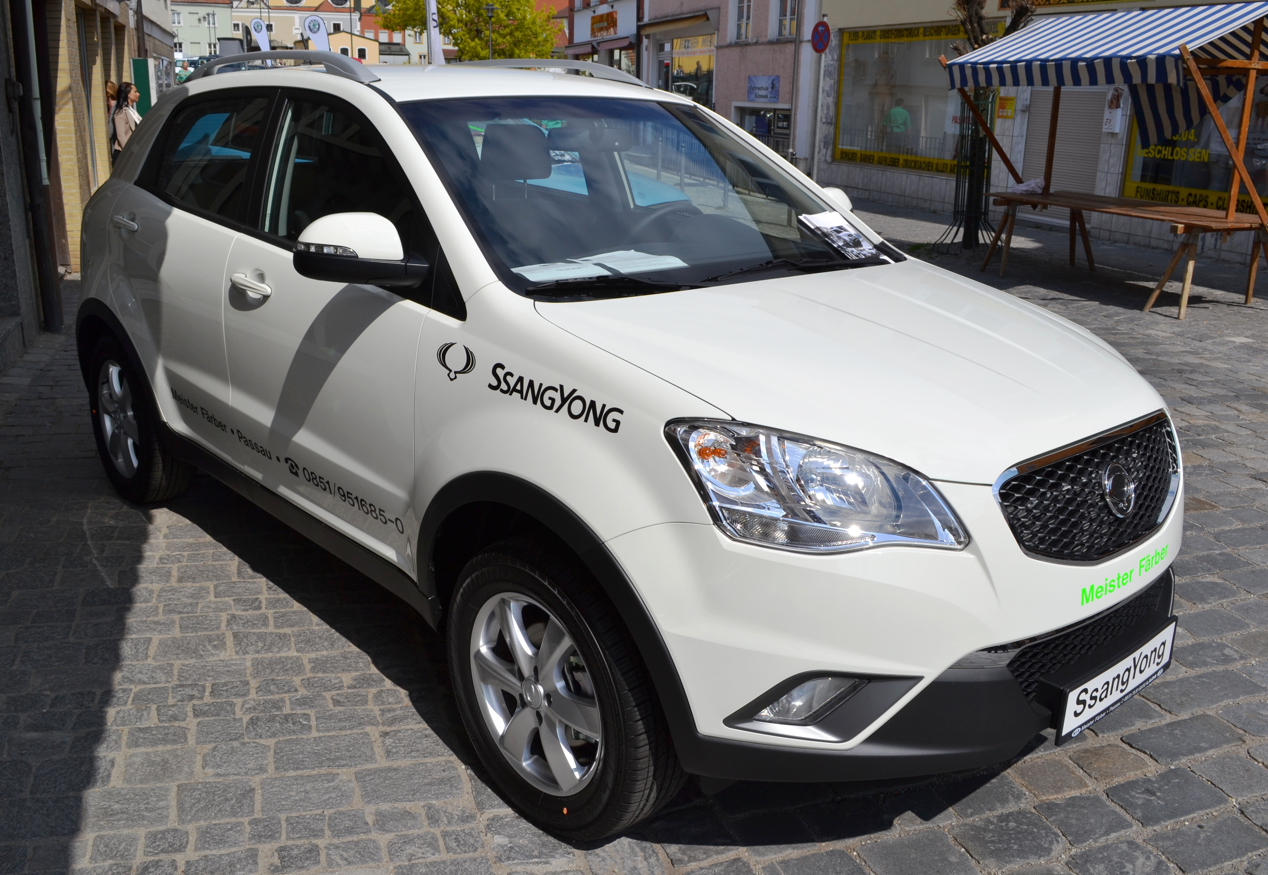 SsangYong Korando D20T.